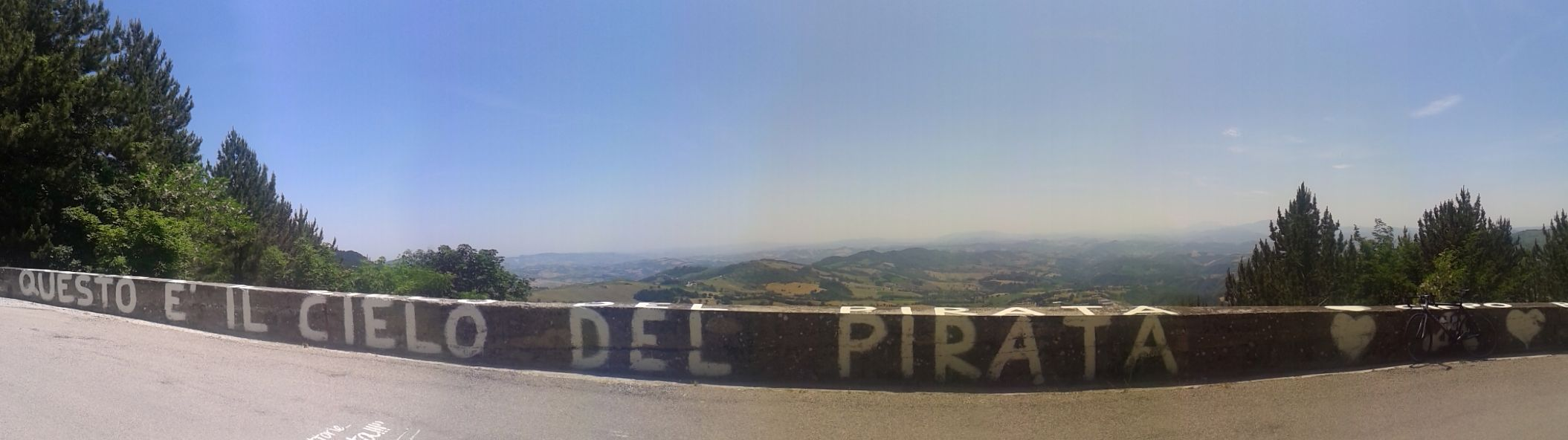 Graffiti zur Erinnerung an Marco Pantani